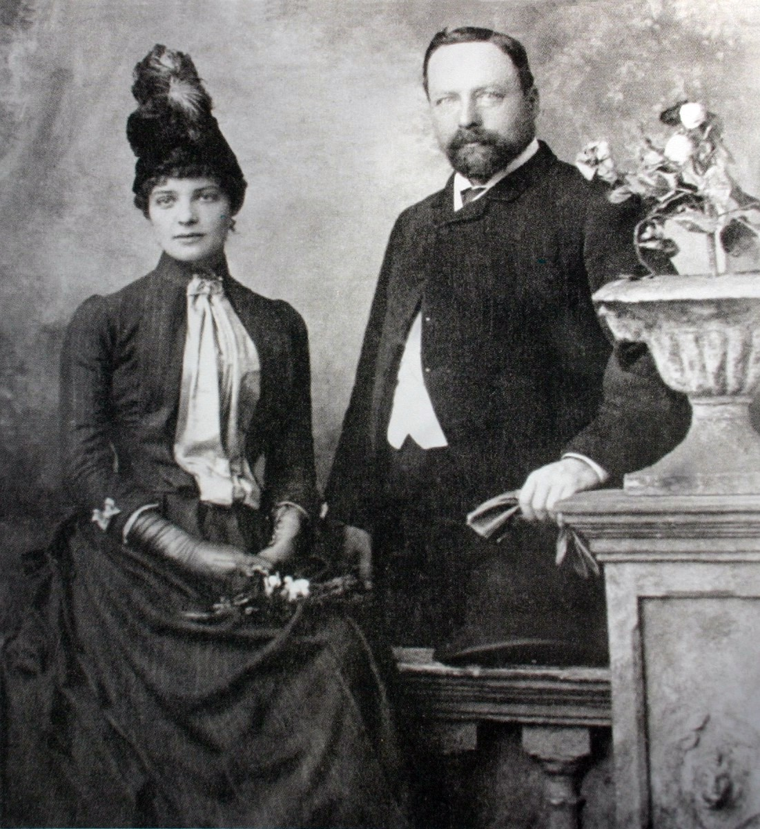 Hermann Eckstein & wife Minnie c1880